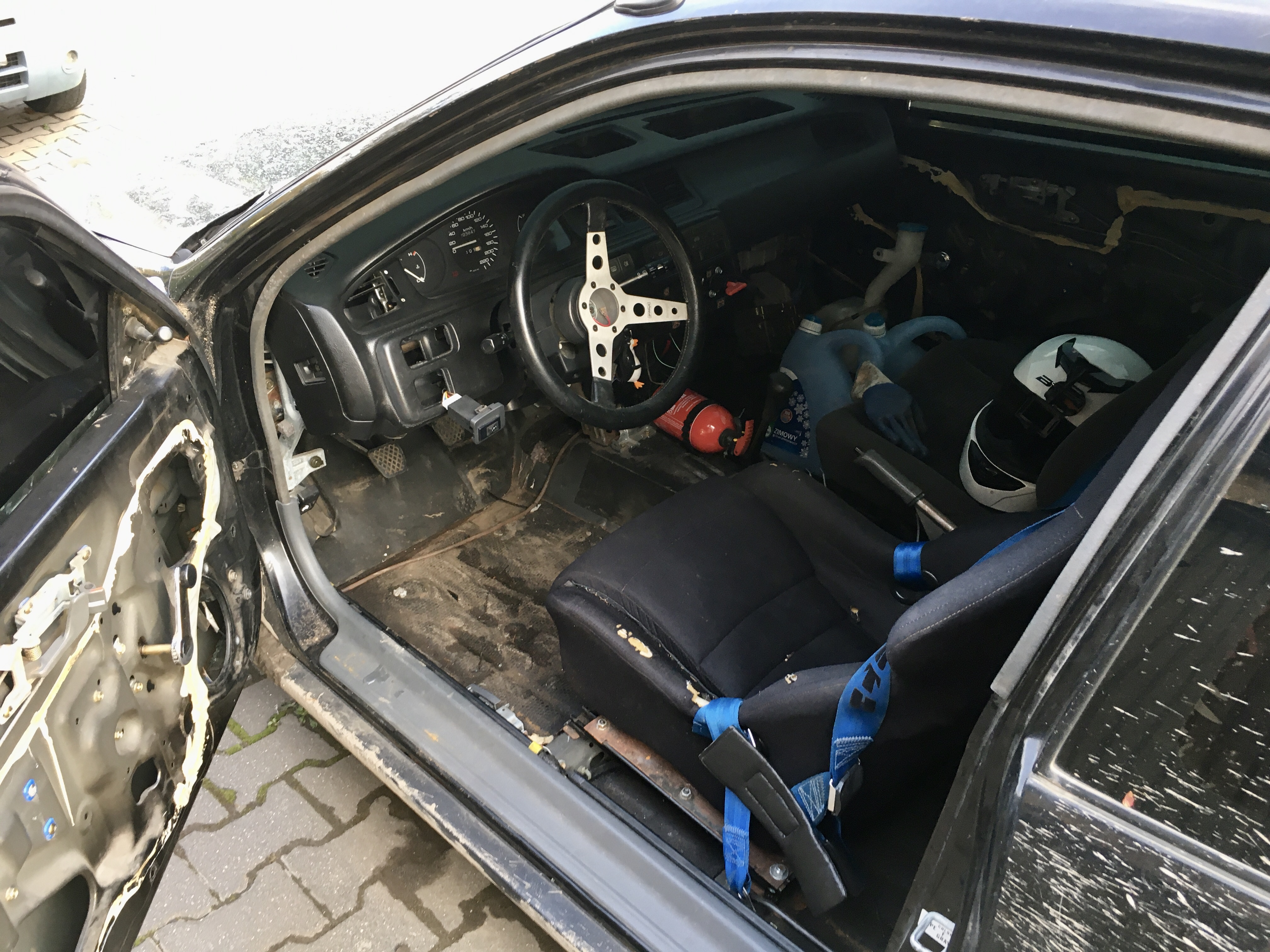 Wnętrze przygotowanego samochodu (Honda Civic) do zawodów Wrak Race